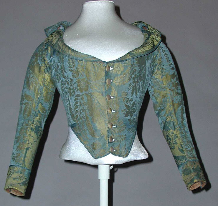 Italian; Caraco